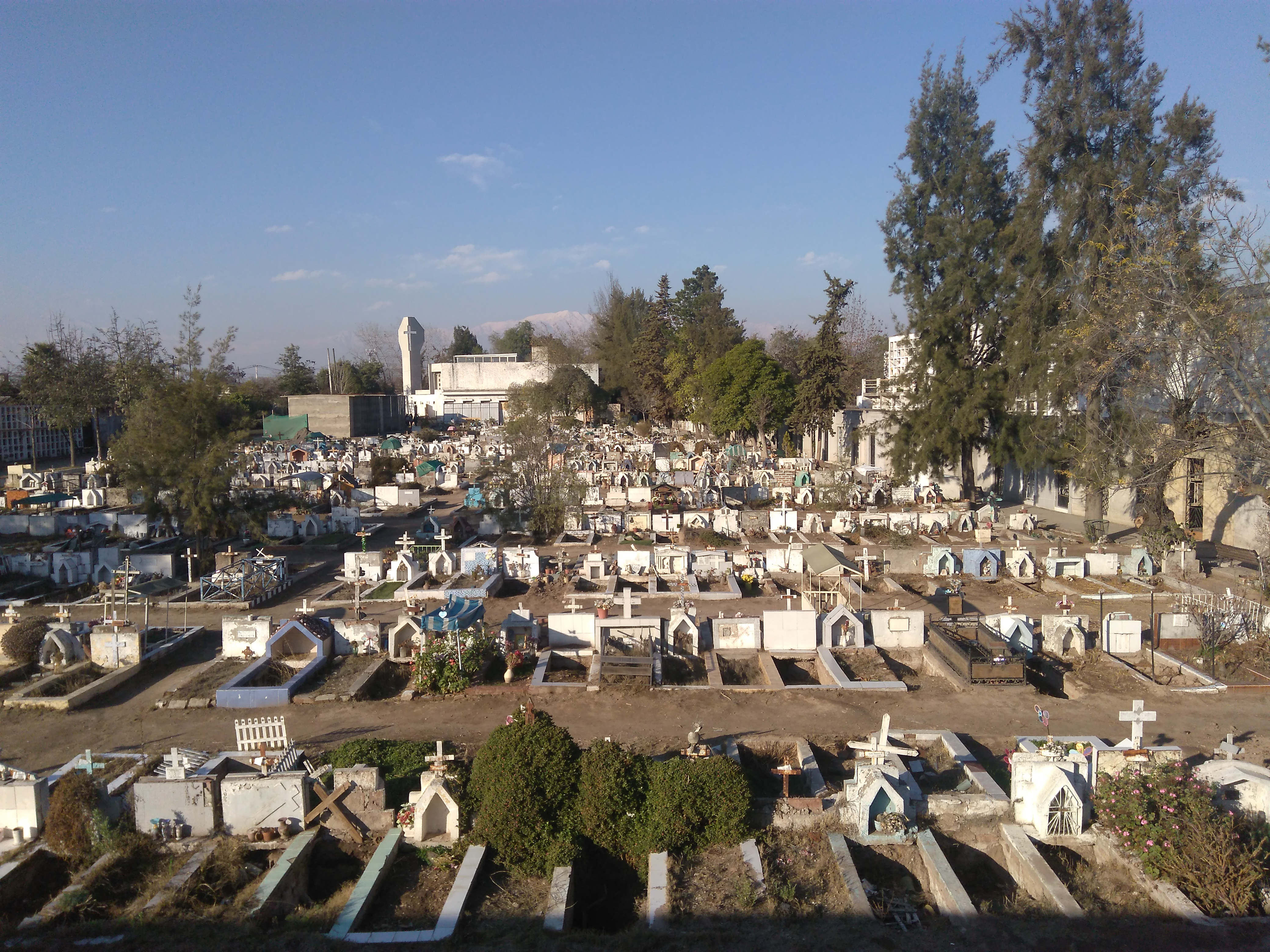 Patio interior del Cementerio Católico de Maipú, ubicado en calle Maipú 900. 16 de junio de 2019.